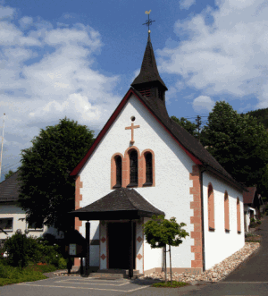 Die im Jahre 1924 erbaute Kapelle in Bonzel